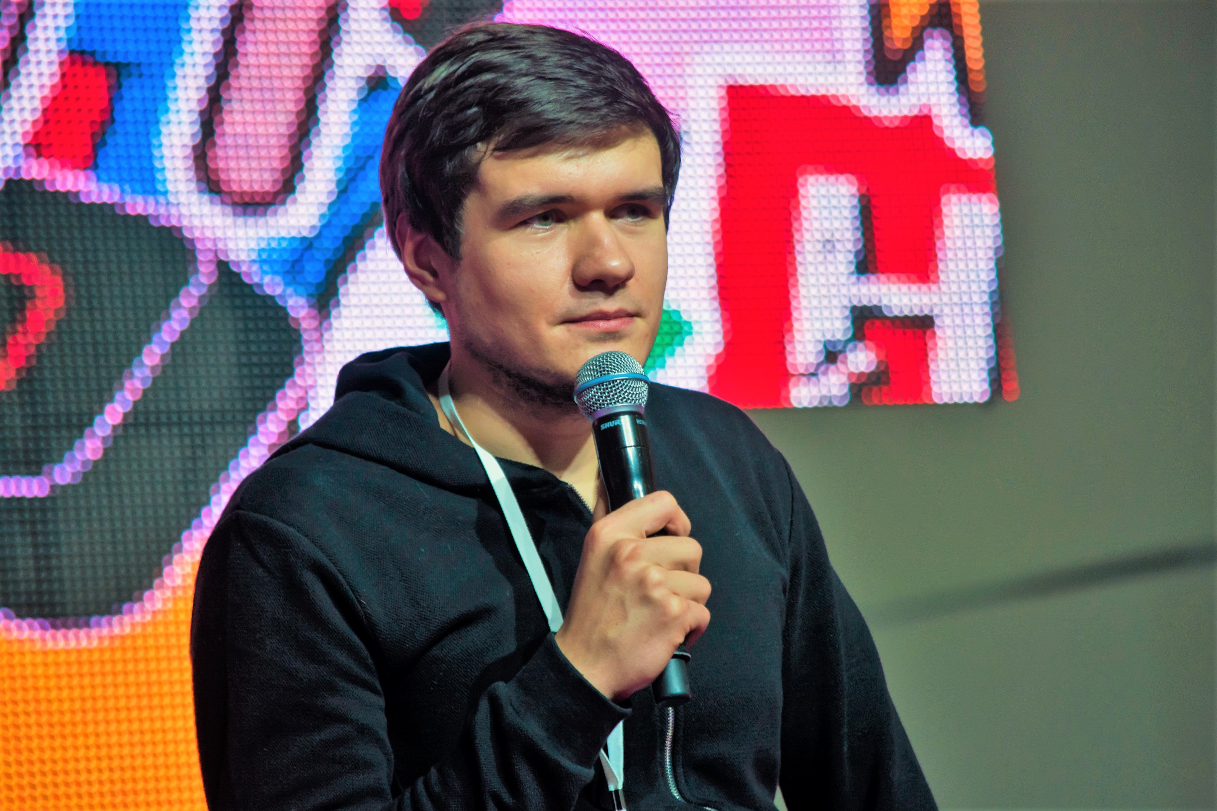 Евгений Баженов на Видфест 2016 в Москве